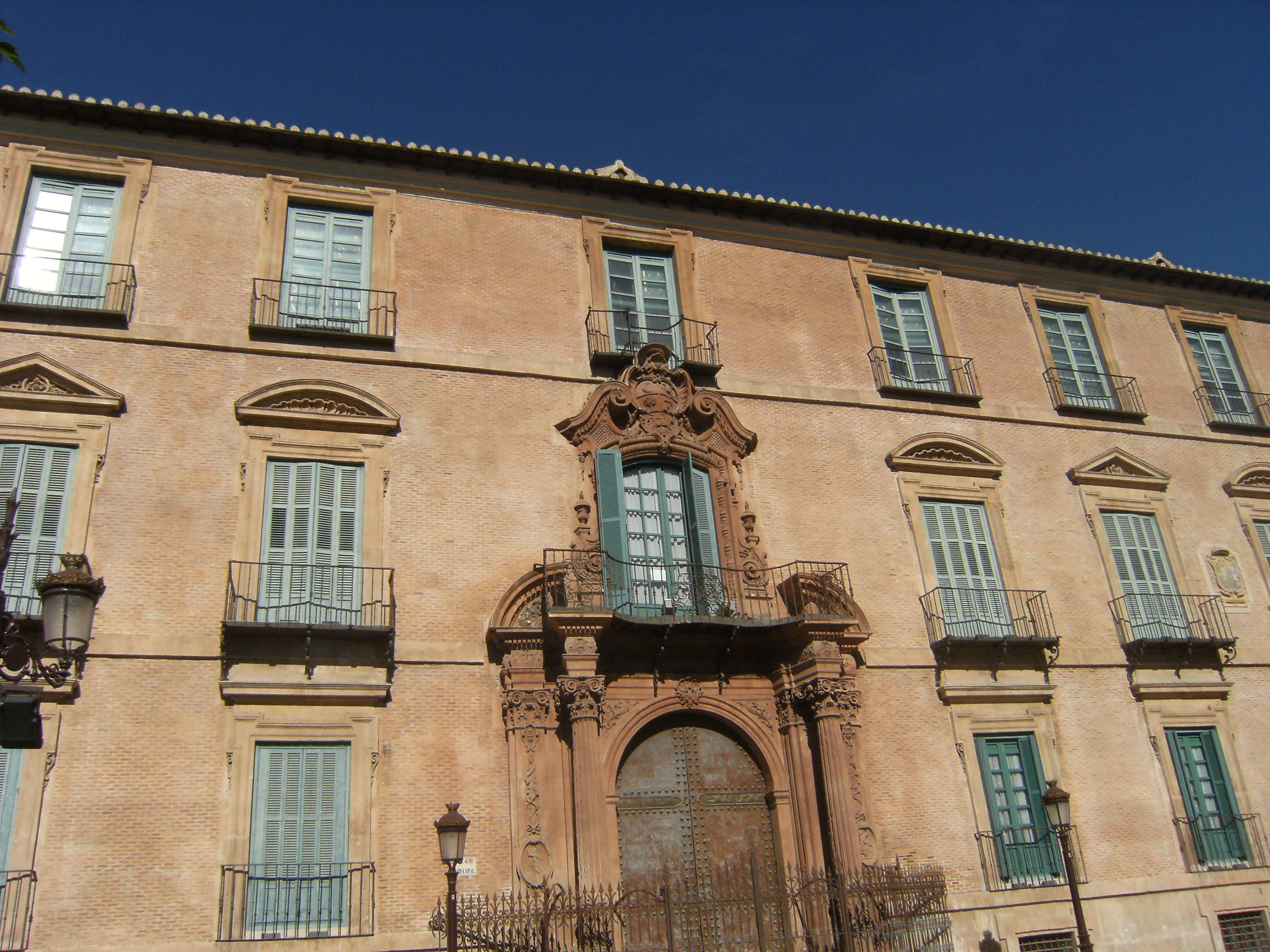 Fachada de la Glorieta o Arenal del Palacio Episcopal de Murcia (España).